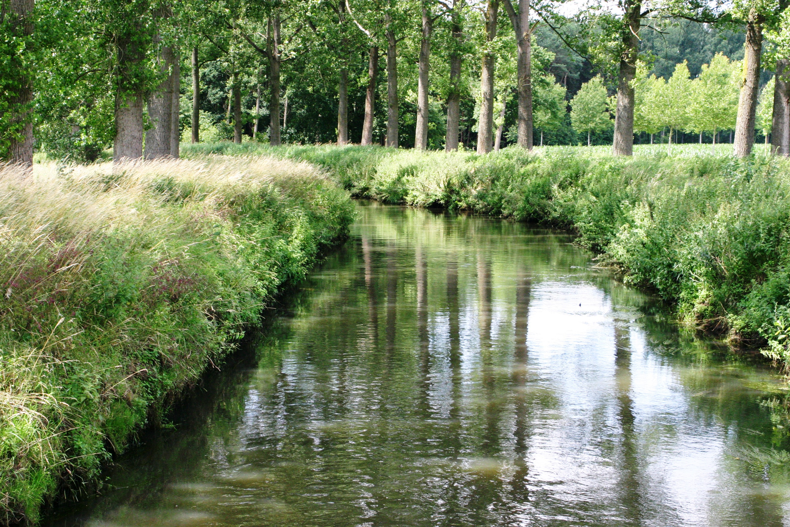 Déi agdäichten Demer beim Schlass 't Loye. Kategorie:Provënz Limburg